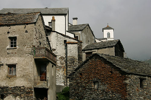 Simplon-Dorf